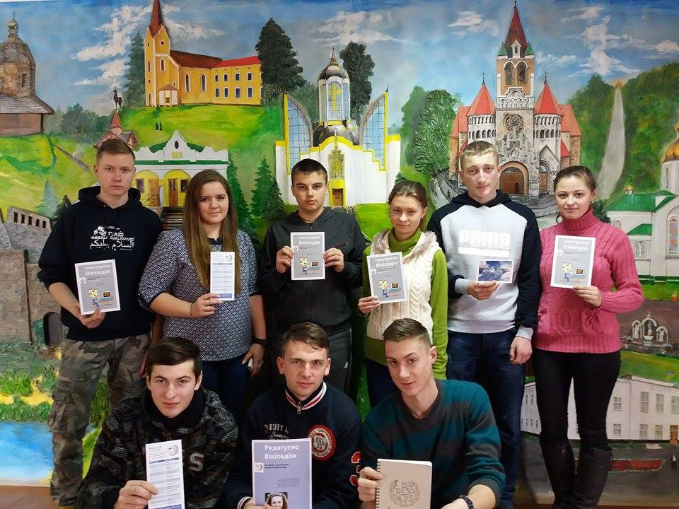 Вікімарафон у ДНЗ «Чортківське ВПУ» смт Заводське, 2017 рік.